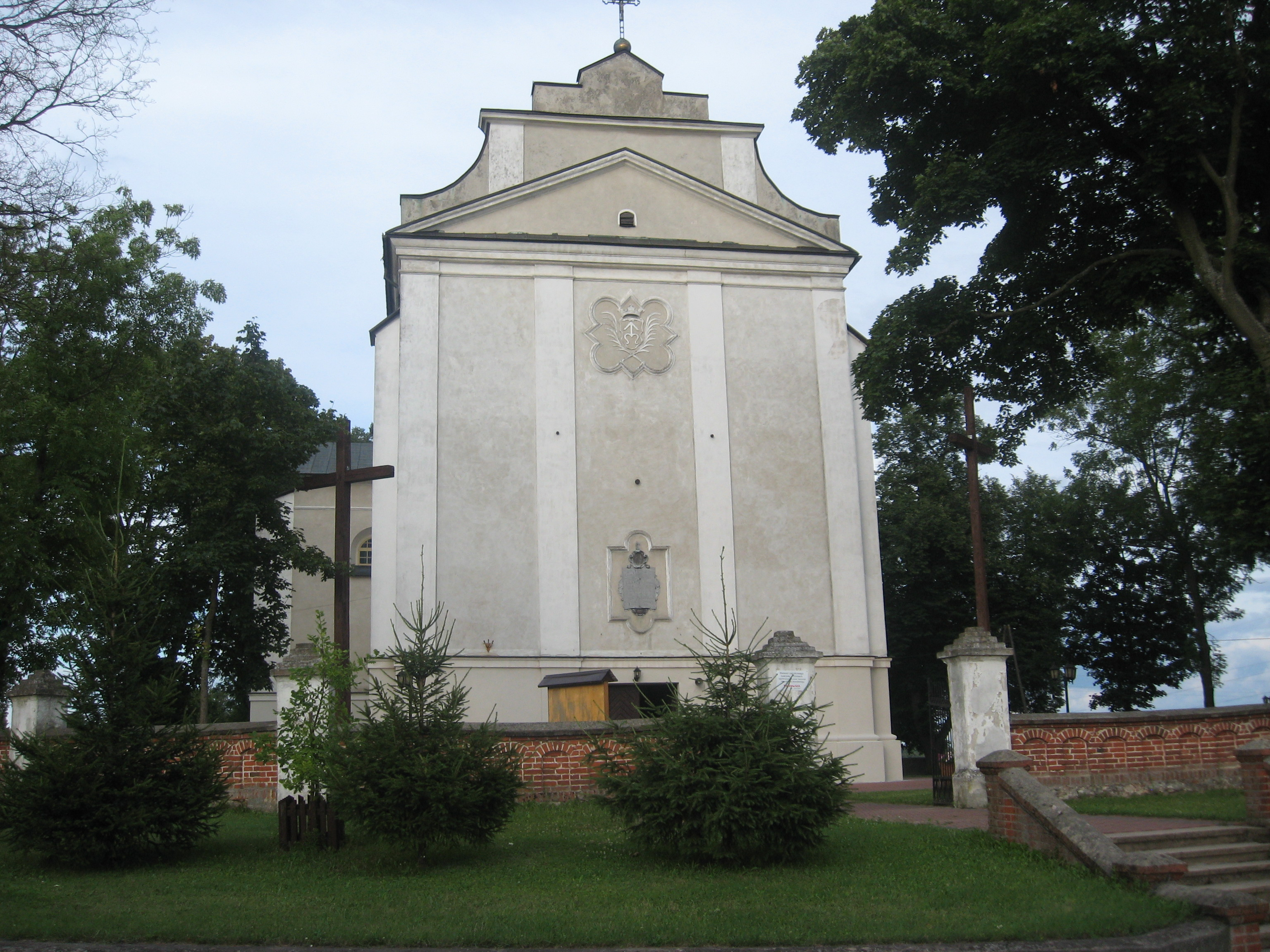 Kościół parafialny w Górkach w gminie Platerów